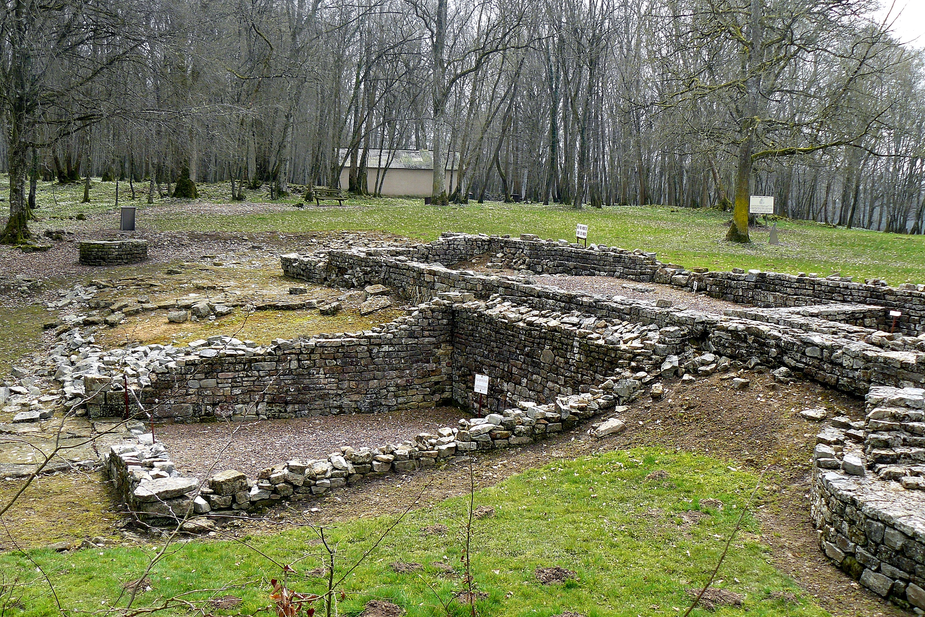 Site archéologique de Compierre (Champallement, Nièvre, France)